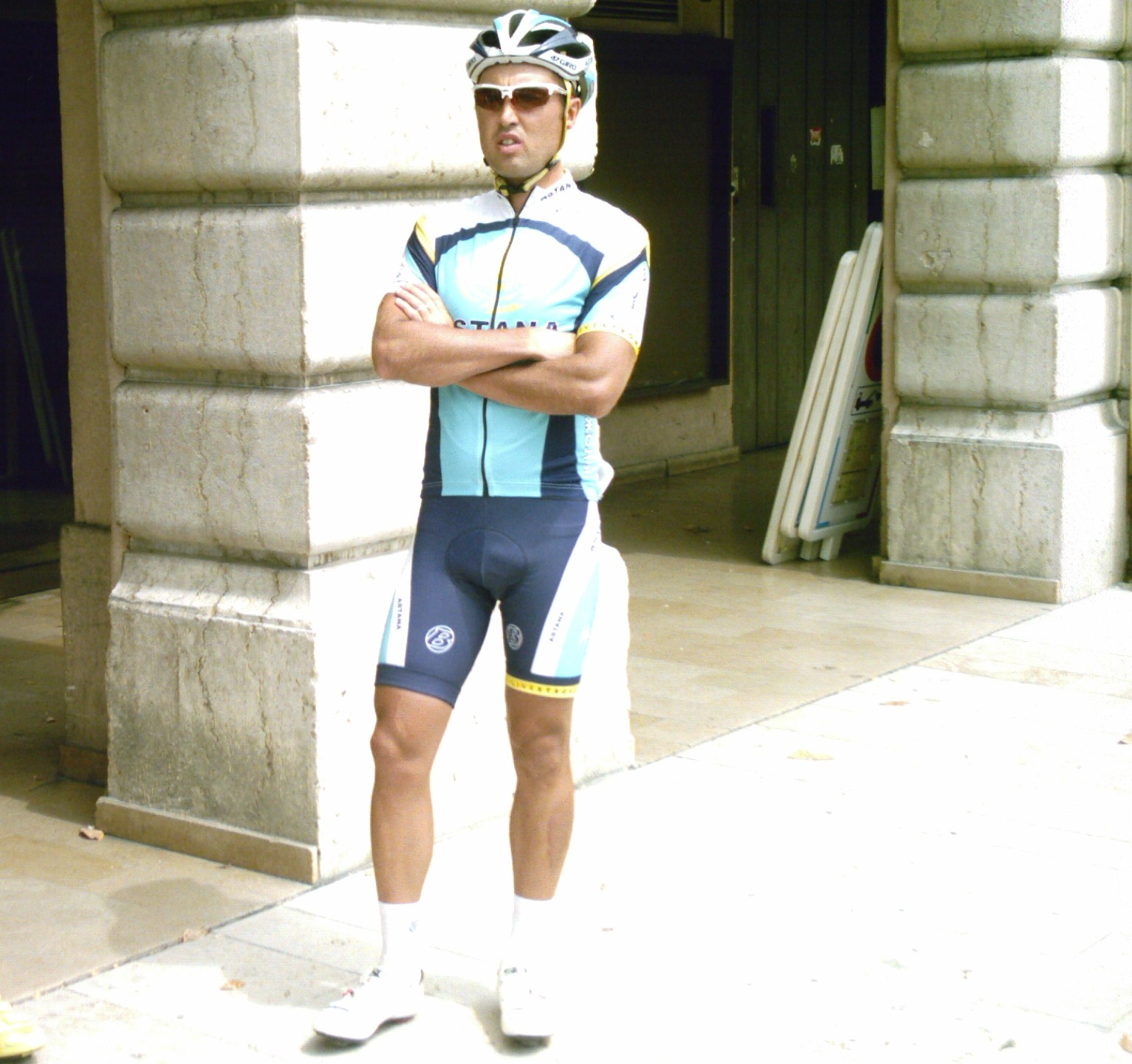 Valeriy Dmitriyev lors de la signature préalable au départ de la première étape du Tour de l'Ain 2009